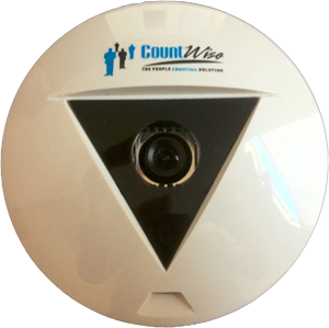 CountWise Optischer Sensor für Kundenzählanlagen